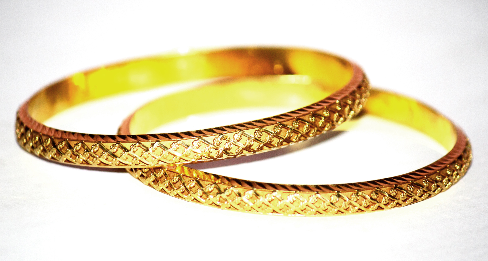 பெண்கள் அணியும் ஒரு சோடி தங்க வளையல் (அ) காப்பு)